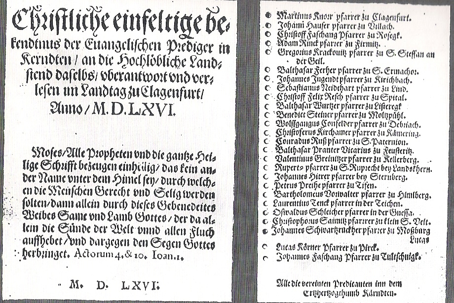 Bekenntnis Kärntner Prädikanten aus dem Umkreis Feldkirchen - Klagenfurt - Villach zum Protestantischen Glauben. 1566. Original in der Nationalbibliothek Wien.